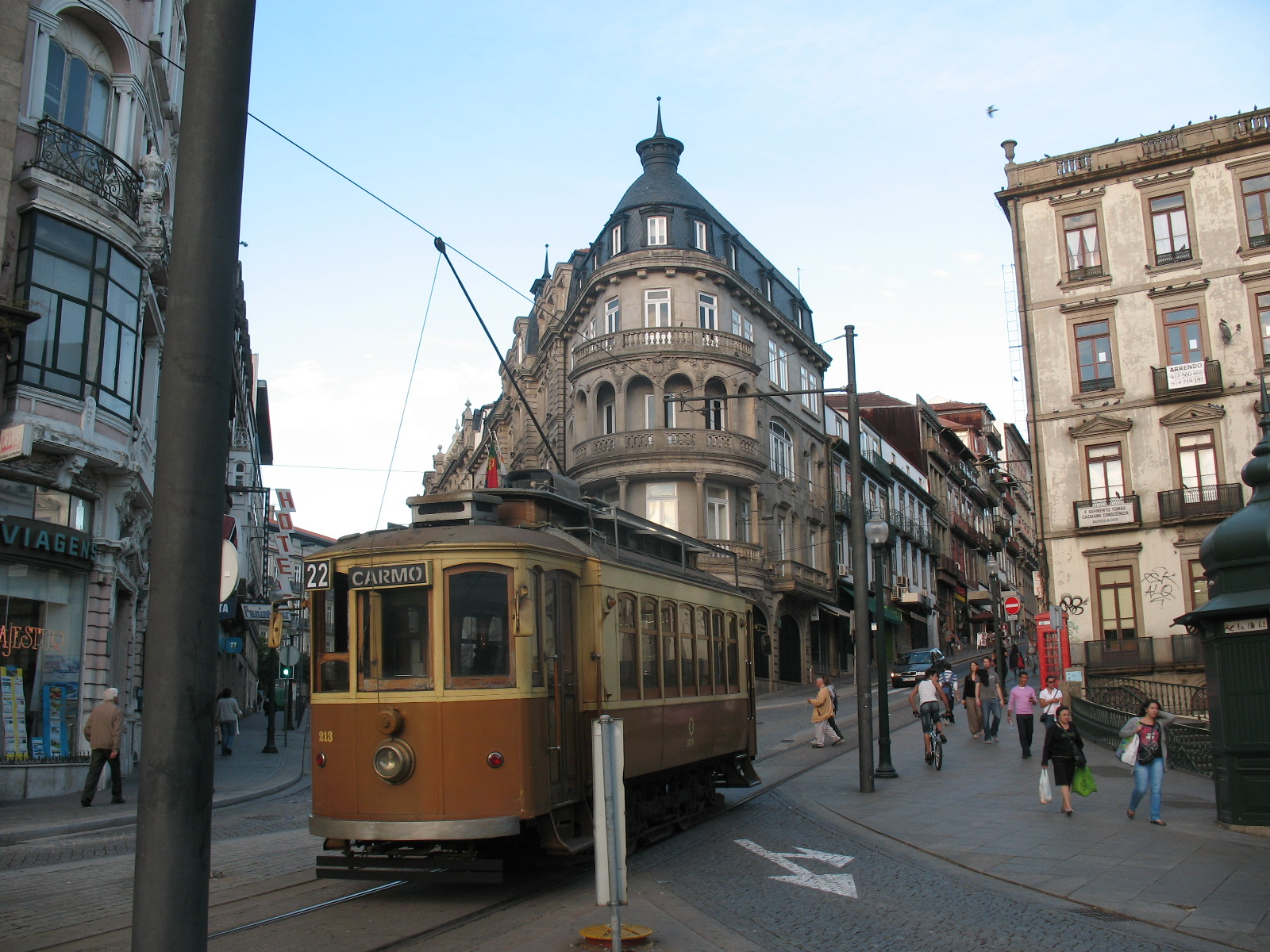 Старинный электротранспорт города